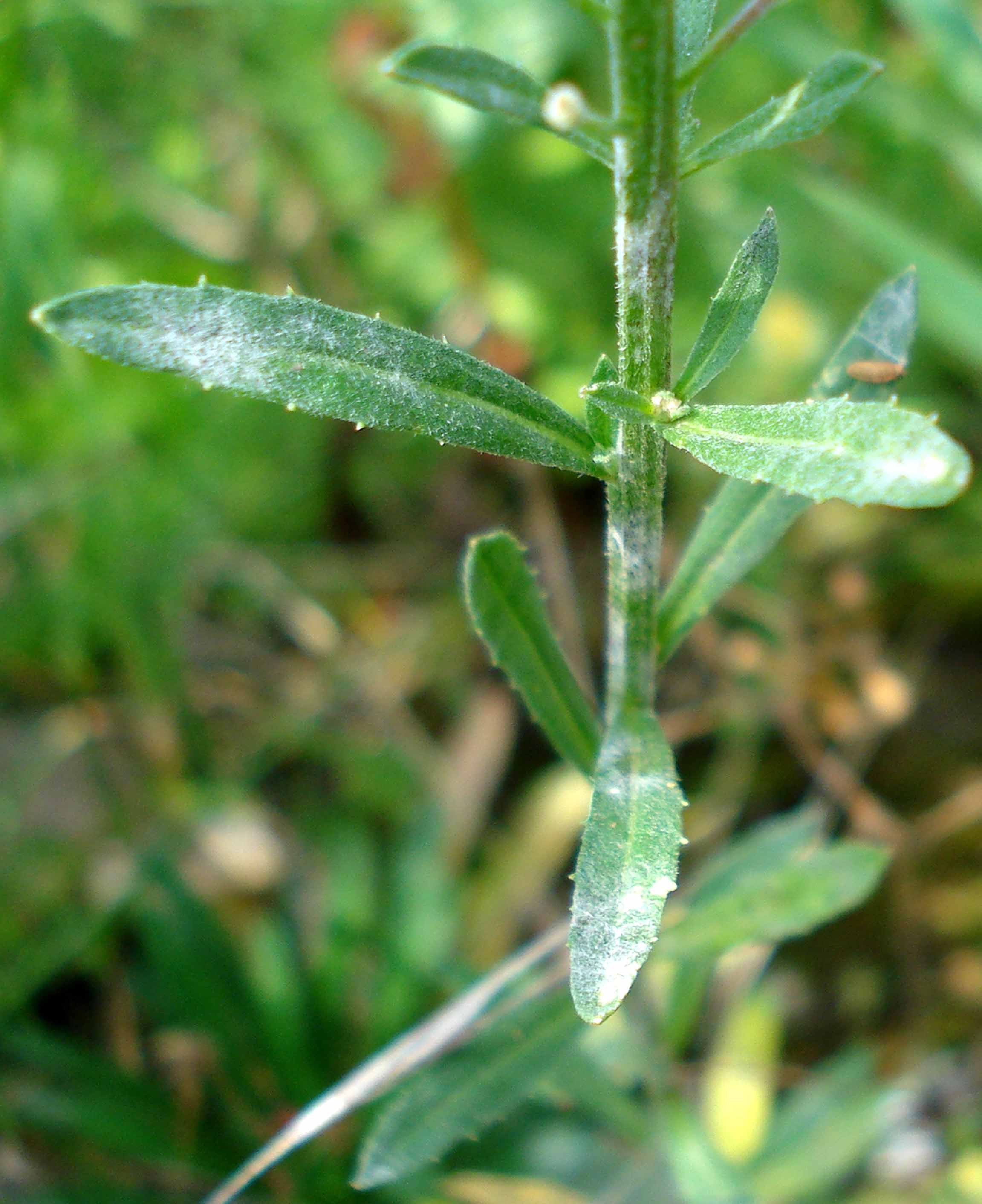 Erysimum hieracifolium (Unterfranken, Germany)